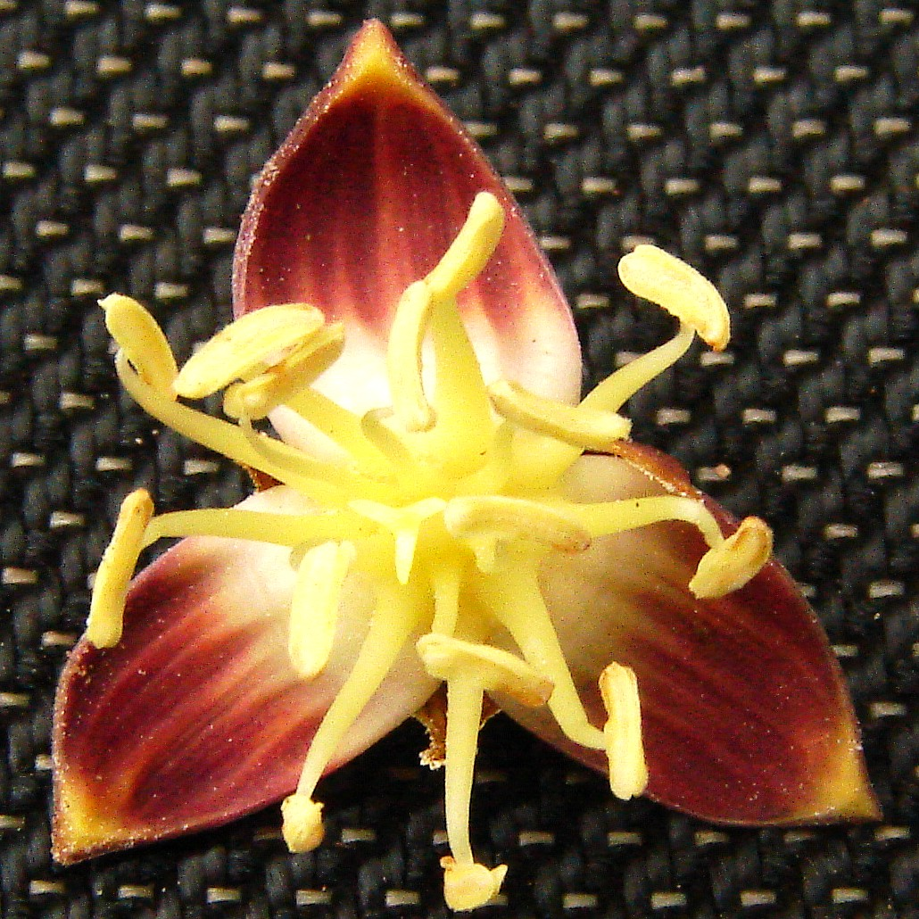 Detalle flor masculina. Foto: Oscar Fernandez , JBN